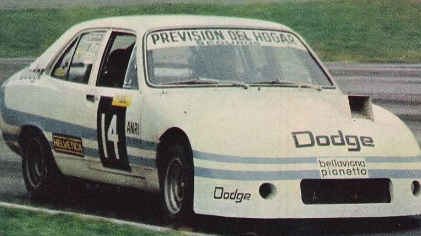 Dodge 1500 de Jorge Omar Del Río del TC2000, campeón 1980.